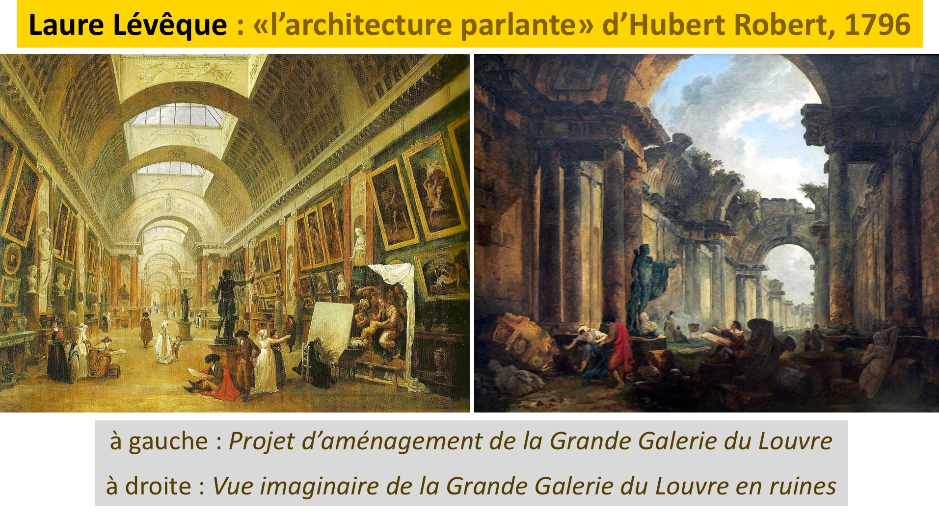 Hubert Robert : Projet d’aménagement de la Grande Galerie du Louvre (1796). Hubert Robert : Vue imaginaire de la Grande Galerie du Louvre en ruines (1796)